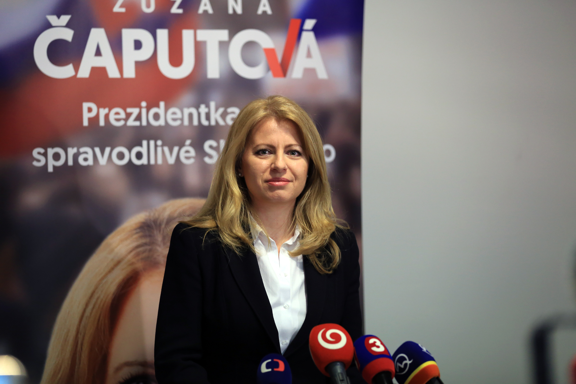 Zuzana Čaputová počas tlačovej konferencie, na ktorej v reakcii na prieskum preferencií prezidentských kandidátov agentúry AKO oznámila, že bude pokračovať vo svojej prezidentskej kampani. V pozadí za ňou je časť jej predvolebného vizuálu.